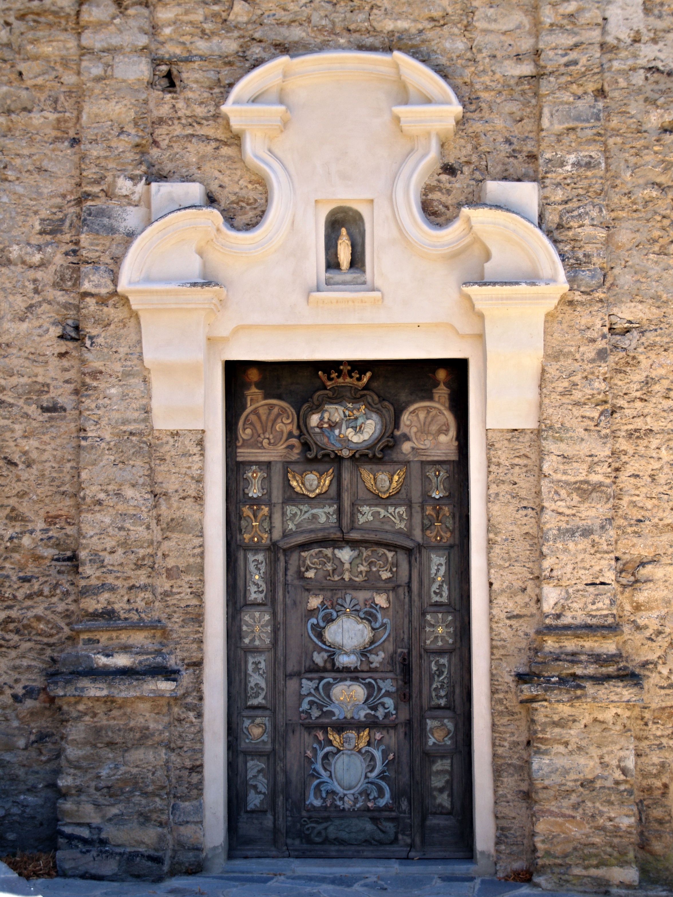 Zuani (Corsica) - Porte d'entrée (MH) de l'église paroissiale Sainte-Marie